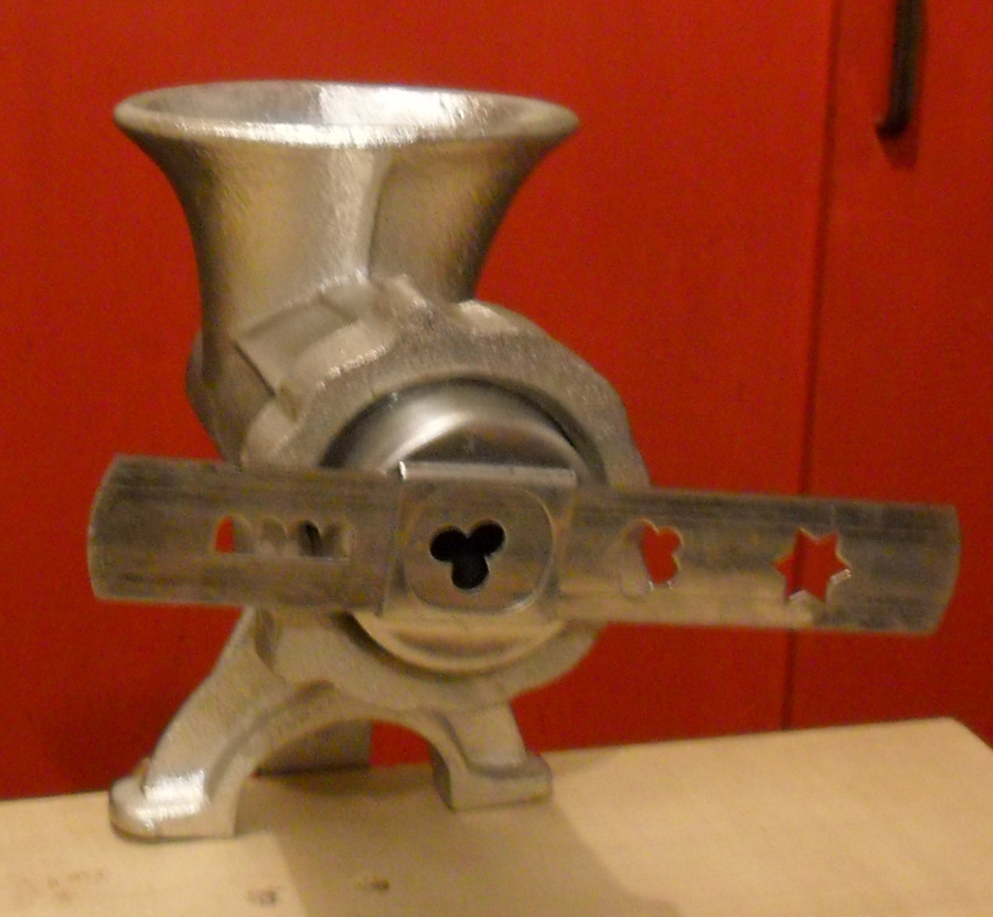 ar benveg evit ober Spritzgebäckene (gwastili eus Alamagn hag Elzas)